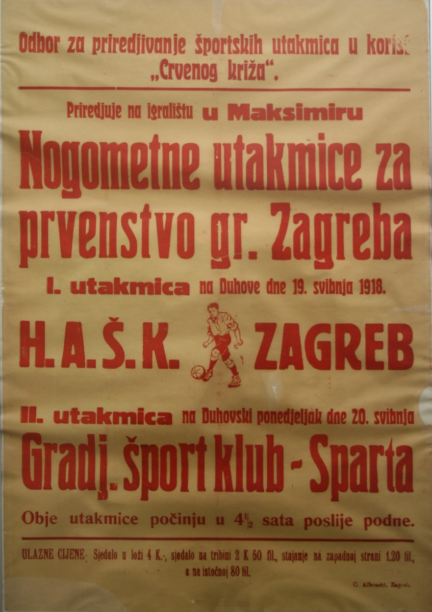 Plakat za nogometne utakmice za prvenstvo grada Zagreba, Maksimir, 19. svibnja 1918. godine u Muzej grada Zagreba.